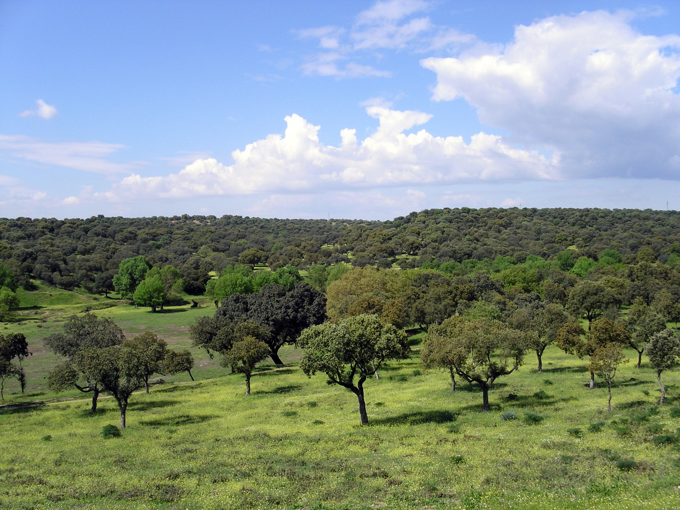 2010-05-01 Soto de Viñuelas